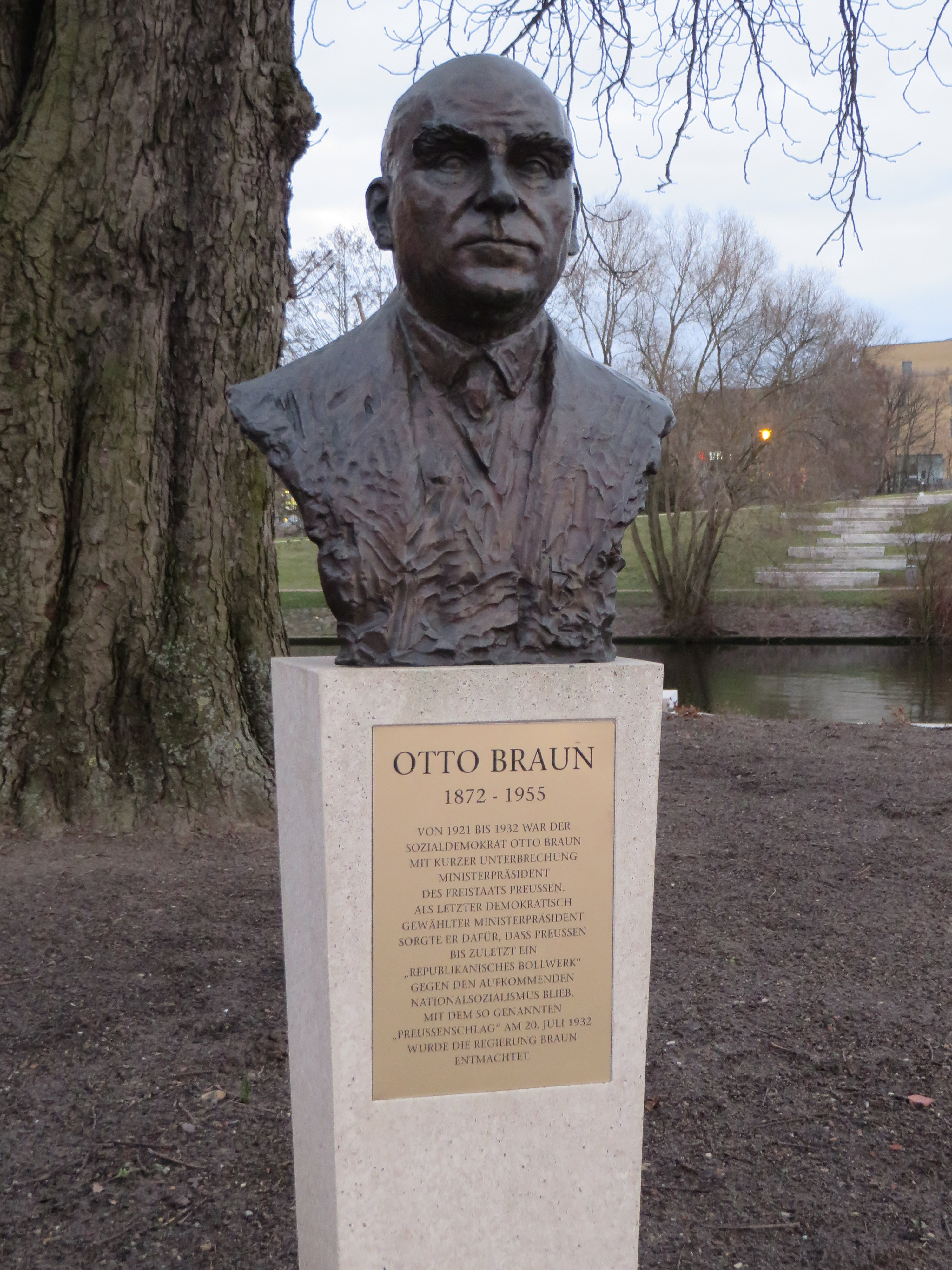 Büste Otto Braun, Potsdam 03/2017